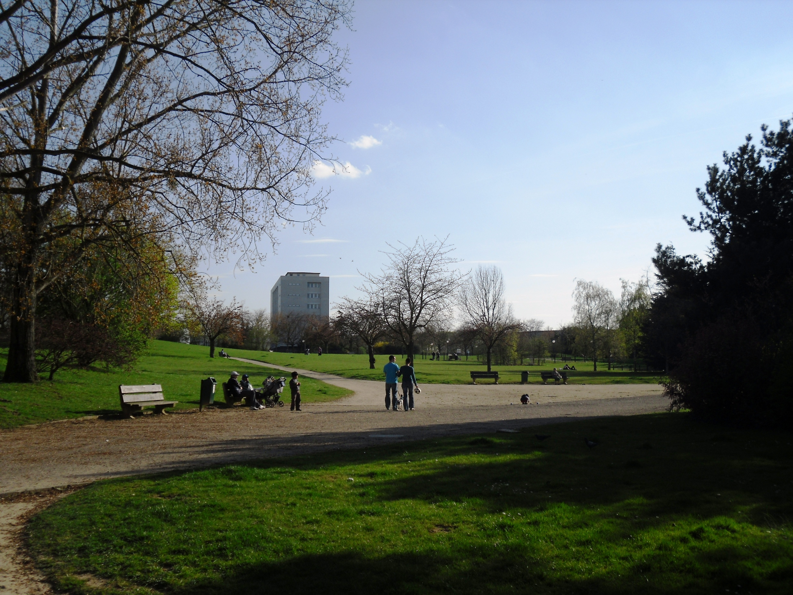 Le parc Descartes à Massy (91)